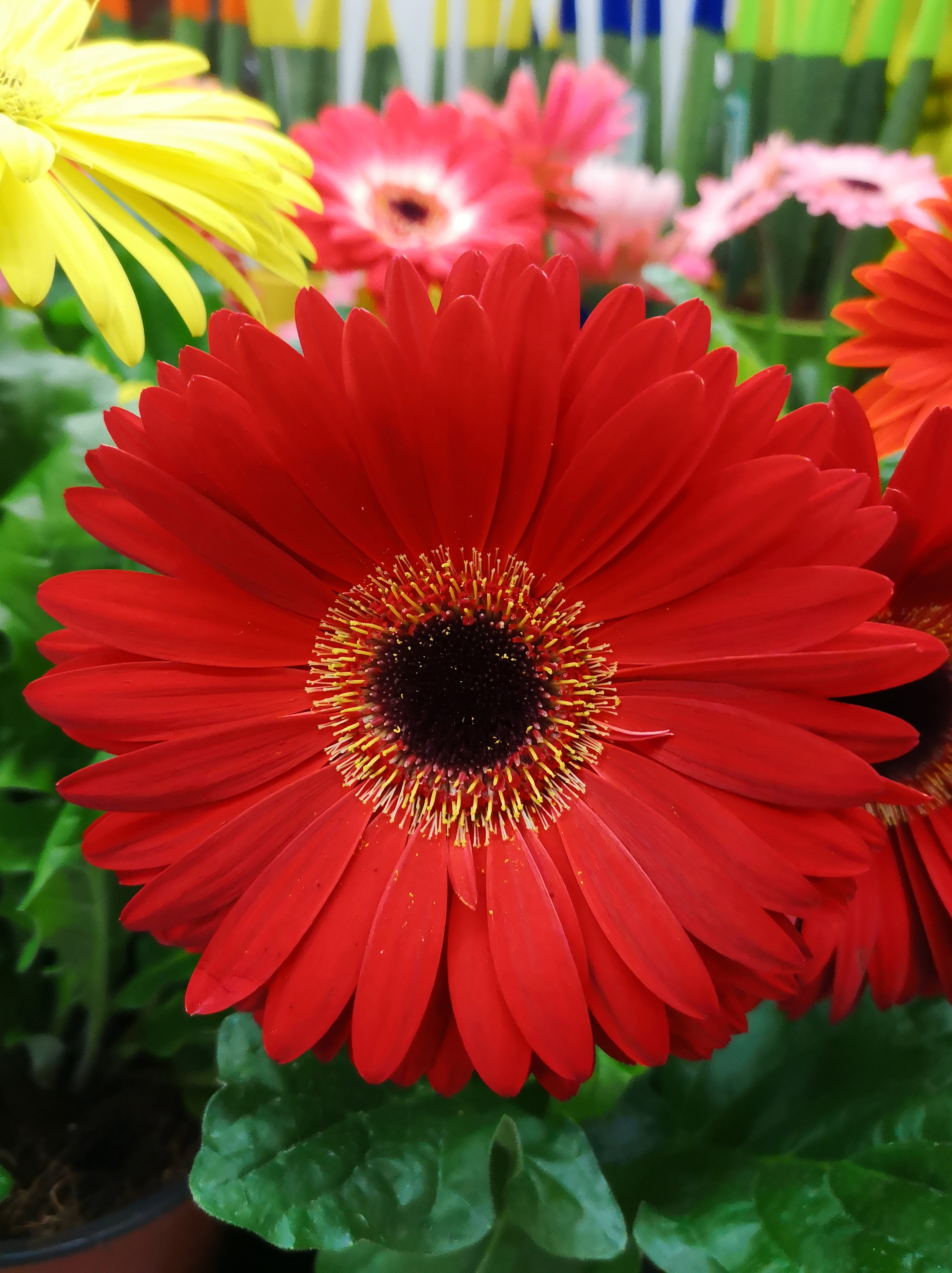 Roślina do bukietów, Bylina. Nazwa rośliny pochodzi od nazwiska niemieckiego botanika Traugotta Gerbera.